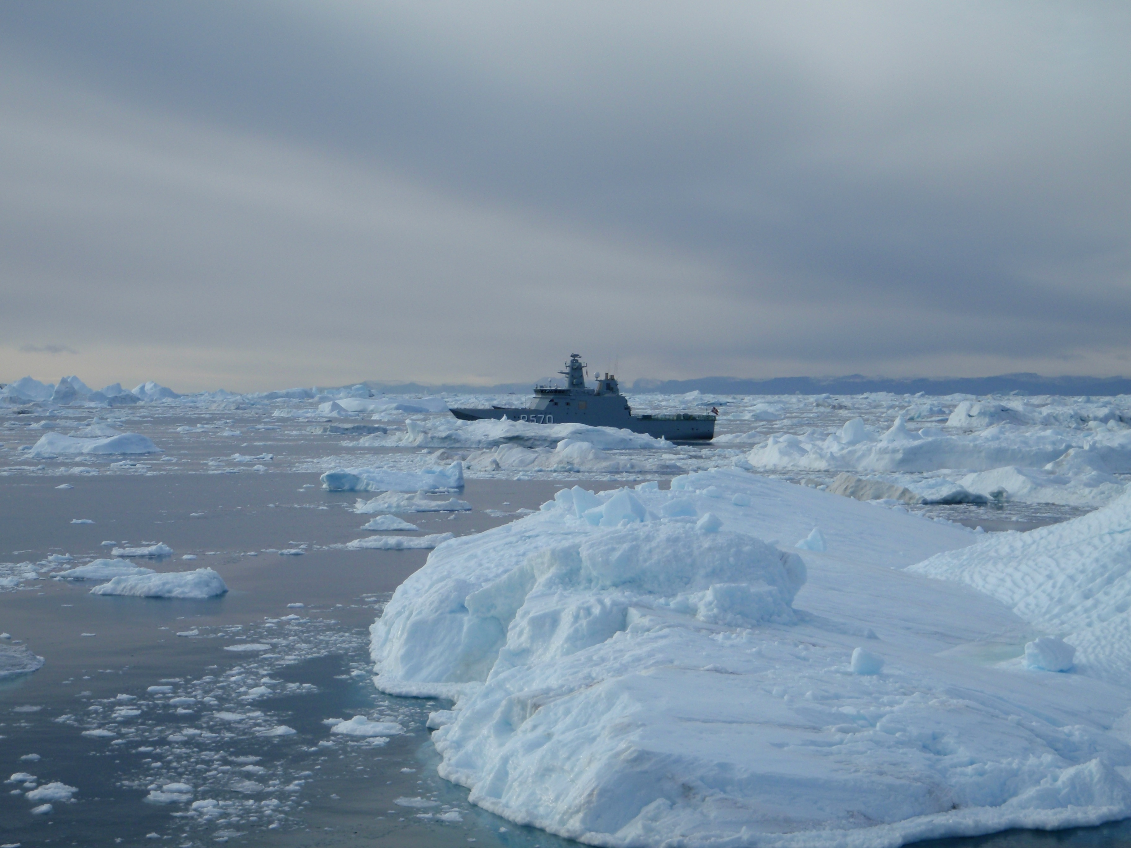 Inspektionsfartøjet KNUD RASMUSSEN under patrulje i Diskobugten (2008).